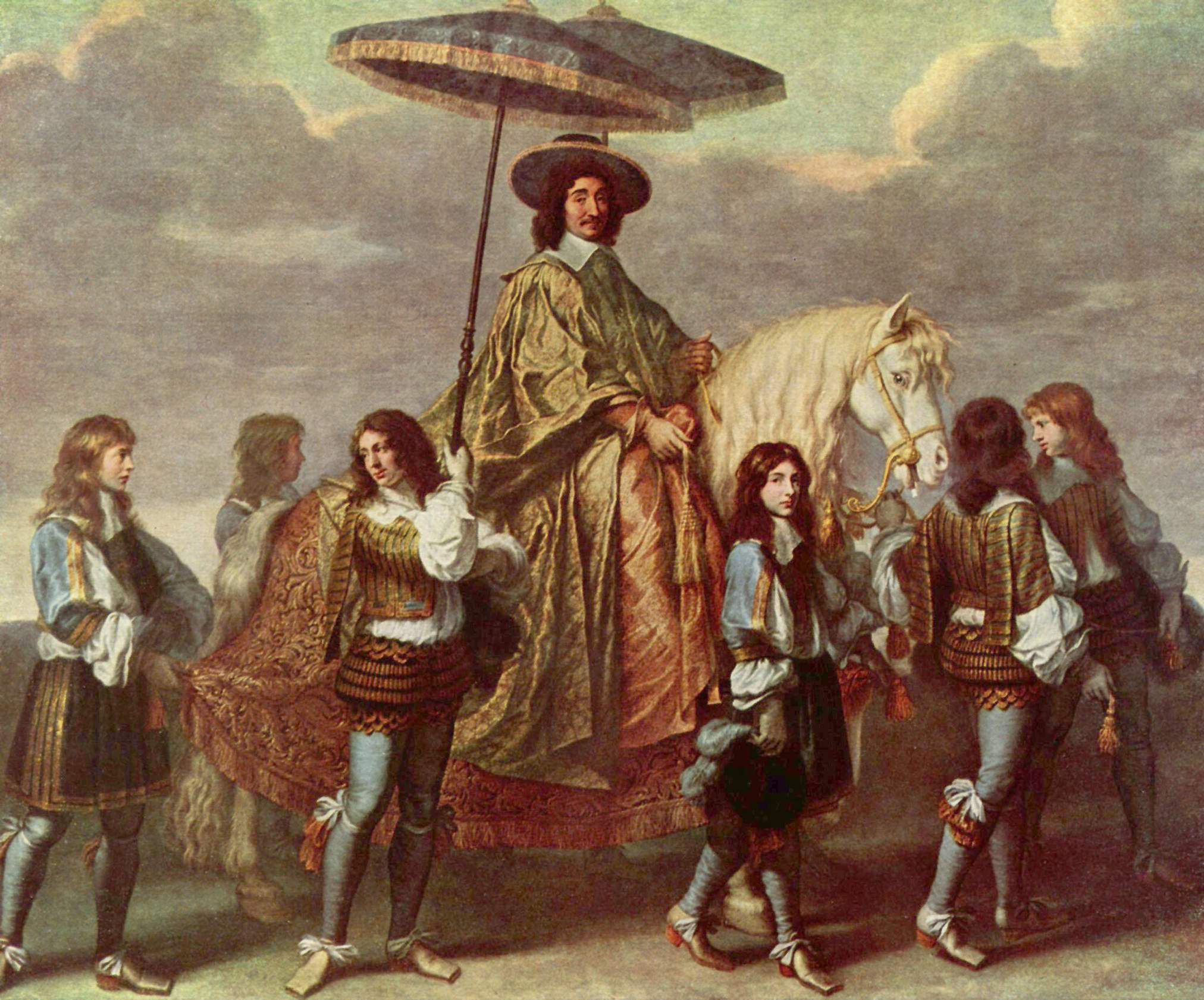 Pierre Séguier, premier magistrat du royaume, fut le principal protecteur de Le Brun pendant sa jeunesse. Ce portrait fut sans doute peint dans le contexte de l’Entrée royale de Louis XIV et de Marie-Thérèse à Paris, le 26 août 1660, après leur mariage à Saint-Jean-de-Luz le 9 juin de la même année.